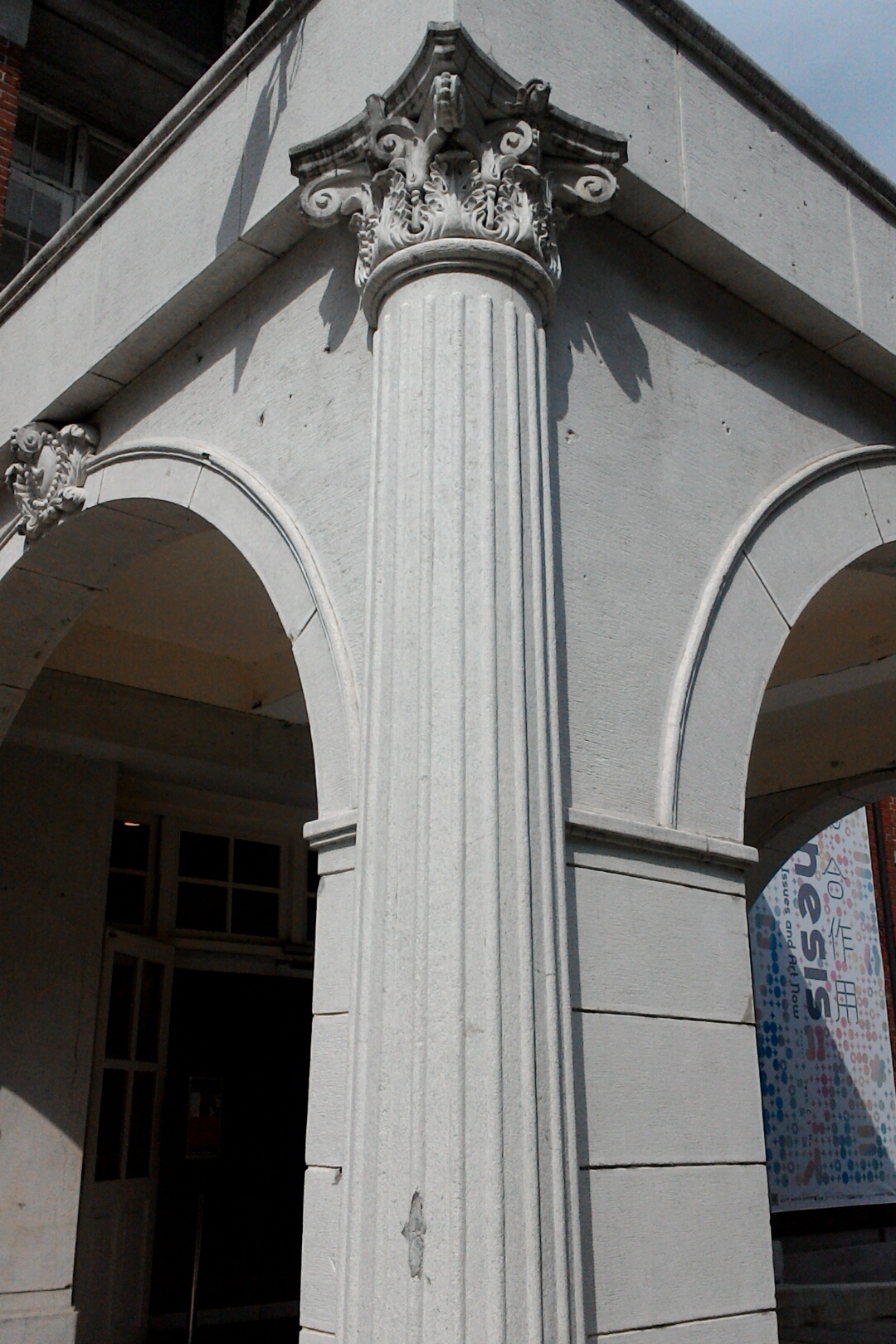 台北市政府舊廈科林斯式柱,台北市大同區建成次分區建泰里